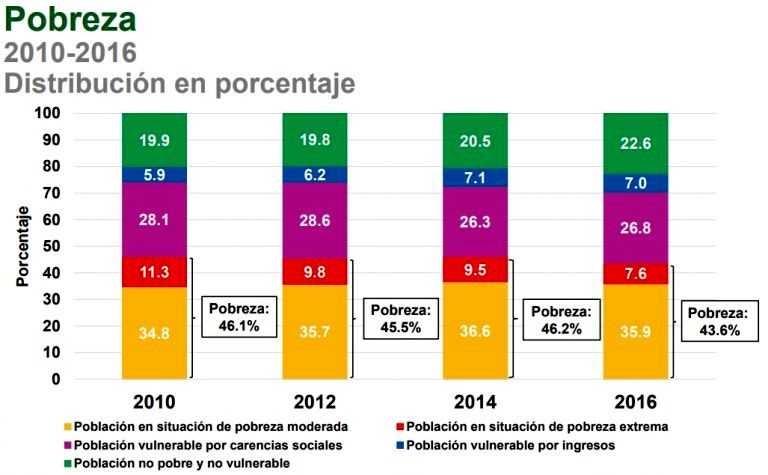 Pobreza en México en diferentes años